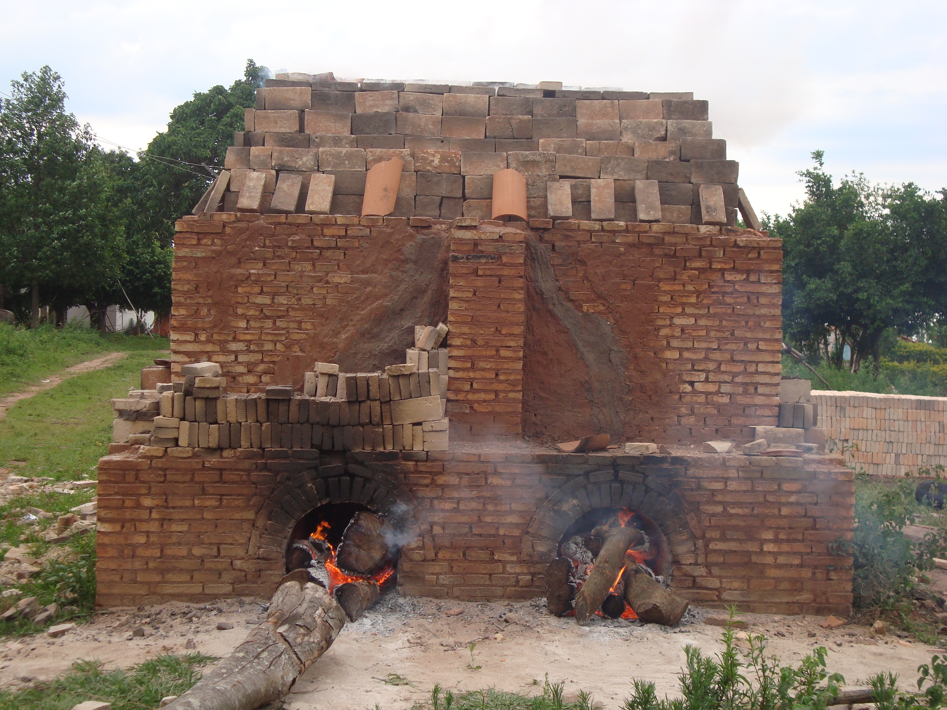 El pueblo de Tobatí (Paraguay) vive en gran parte de la elaboración de ladrillos hechos a mano, y cocidos a leña en hornos como éste.